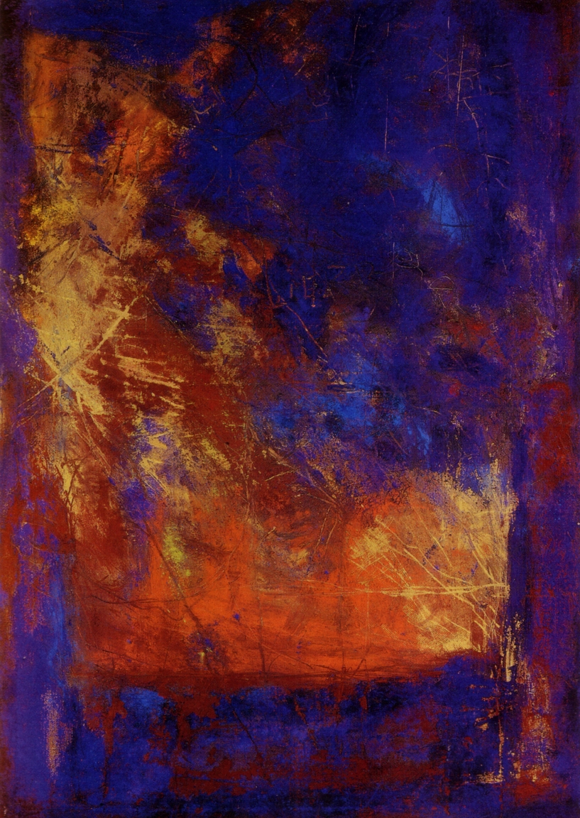 Walter Helsper (1927-1992): o.T., 140 x 100 cm, Pigmentbild, 1992